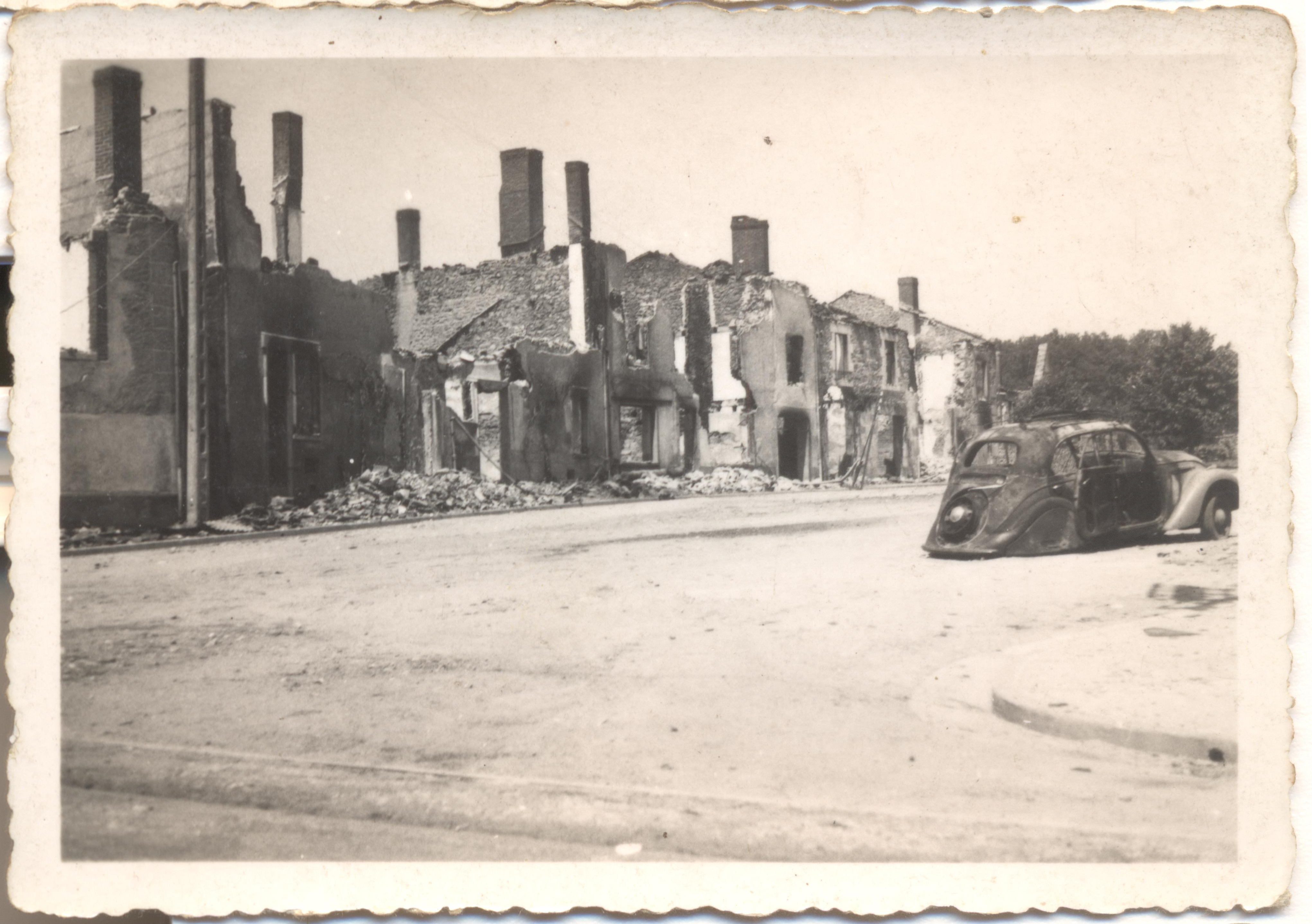 La vila d'Oradour-sur-Glane (Haute Vienne, França) destruïda i en runes, anys 1947-1948. Autor: Joan Masachs Prats (AHS, cedida per Maria Rosa Masachs Borruel)